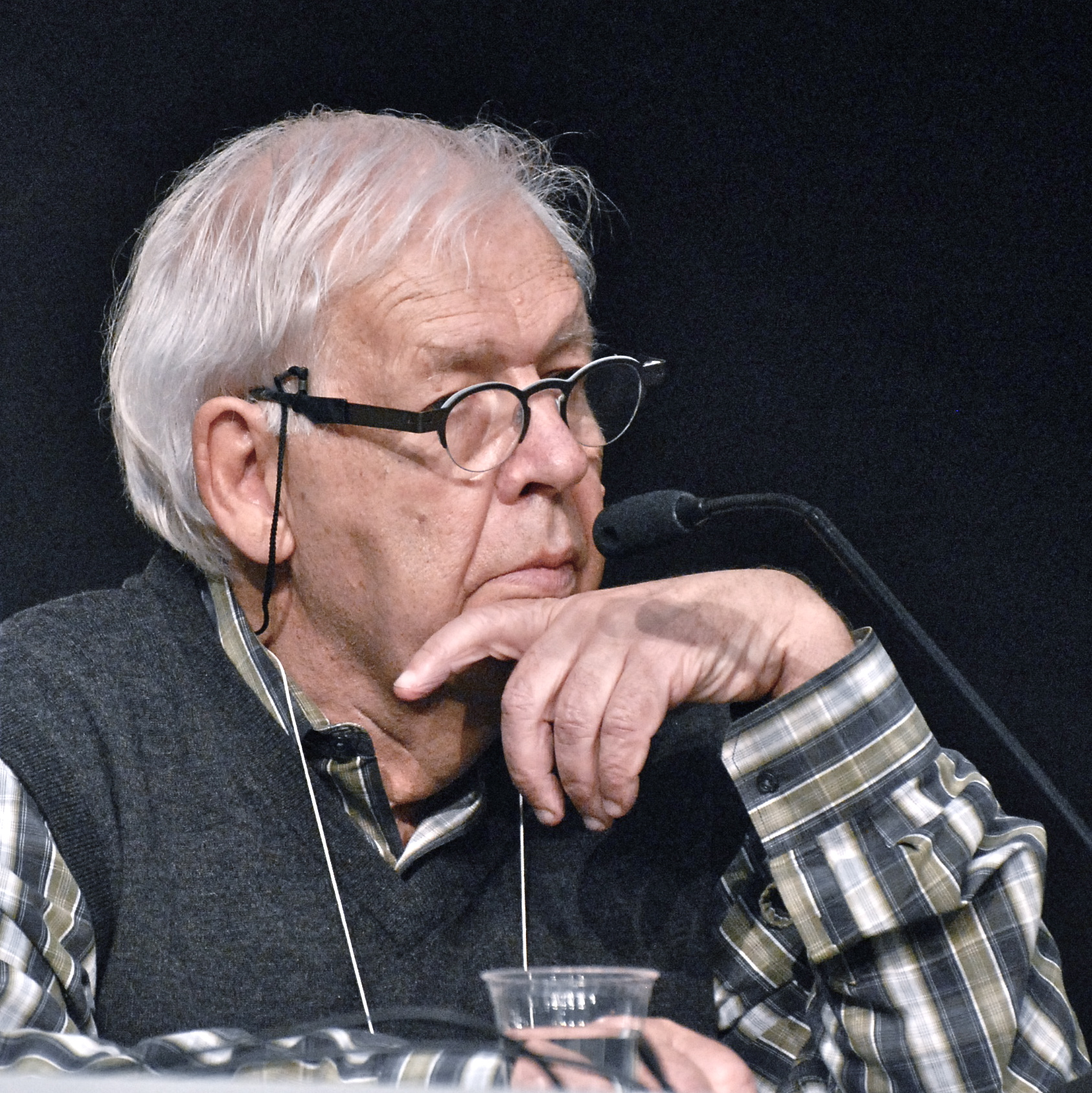 Denis Vaugeois, lors du Salon international du livre de Québec 2012